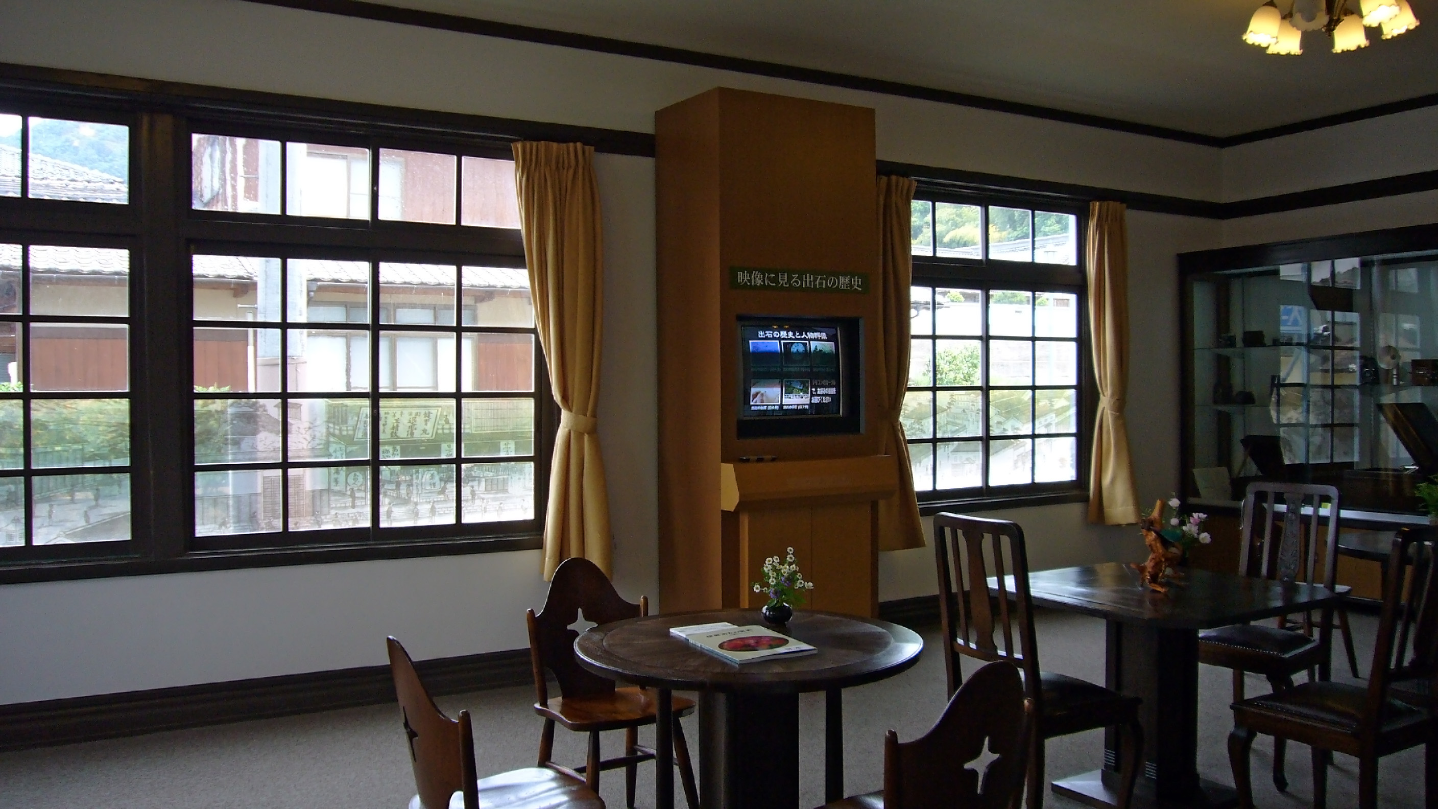 Meiji-Kan in Toyooka, Hyogo, Japan